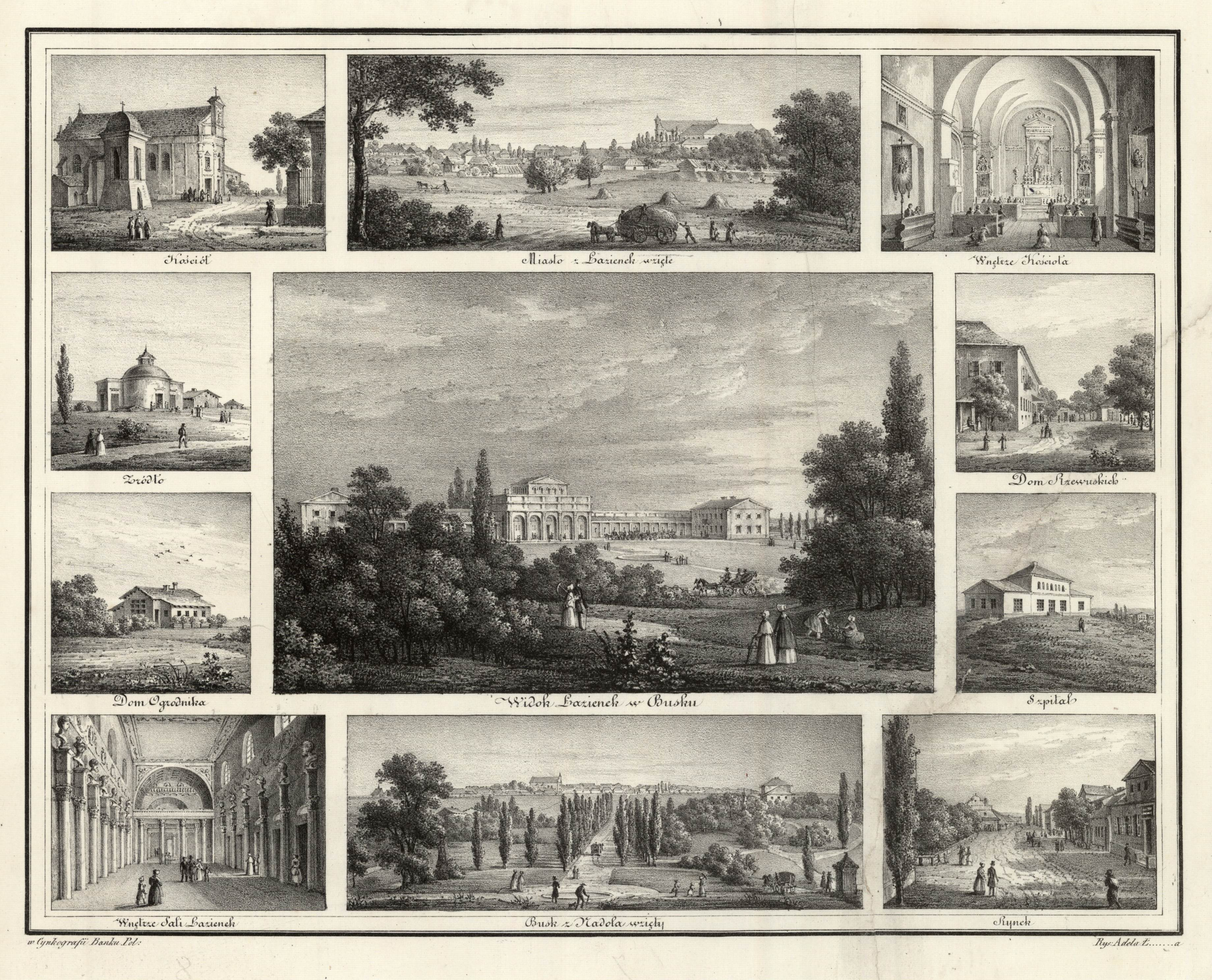 Adela Łubieńska, Widok Łazienek w Busku (...), 1842, Zakład Litograficzny Banku Polskiego (Warszawa), Biblioteka Narodowa